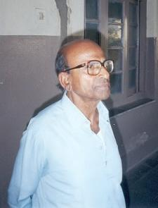 Kanu Sanyal. Photo: Soman